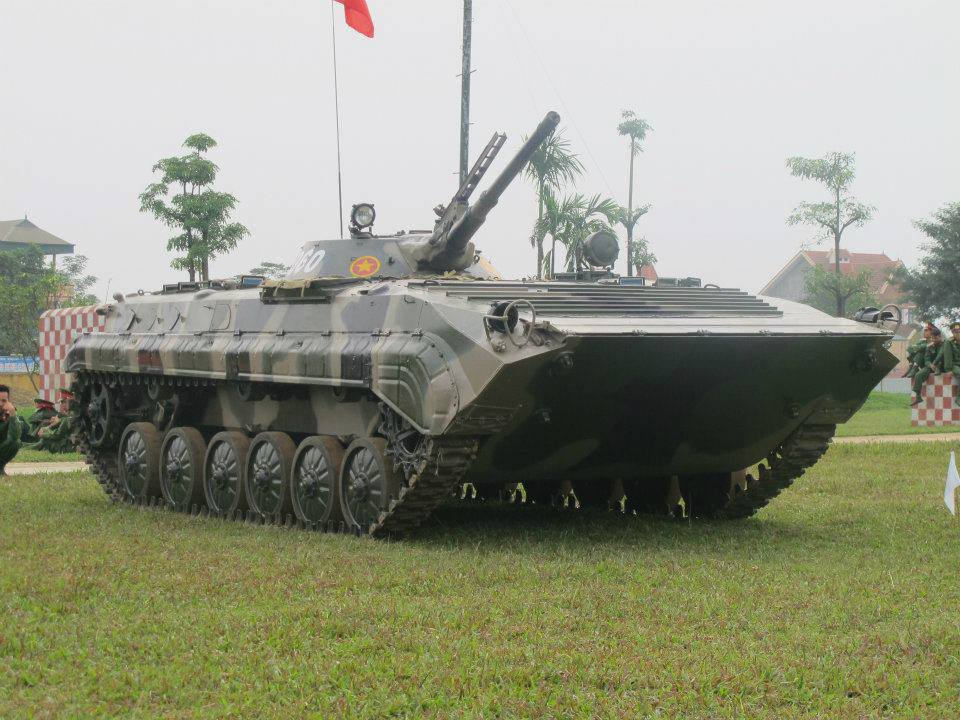 Xe chiến đấu bộ binh BMP-1